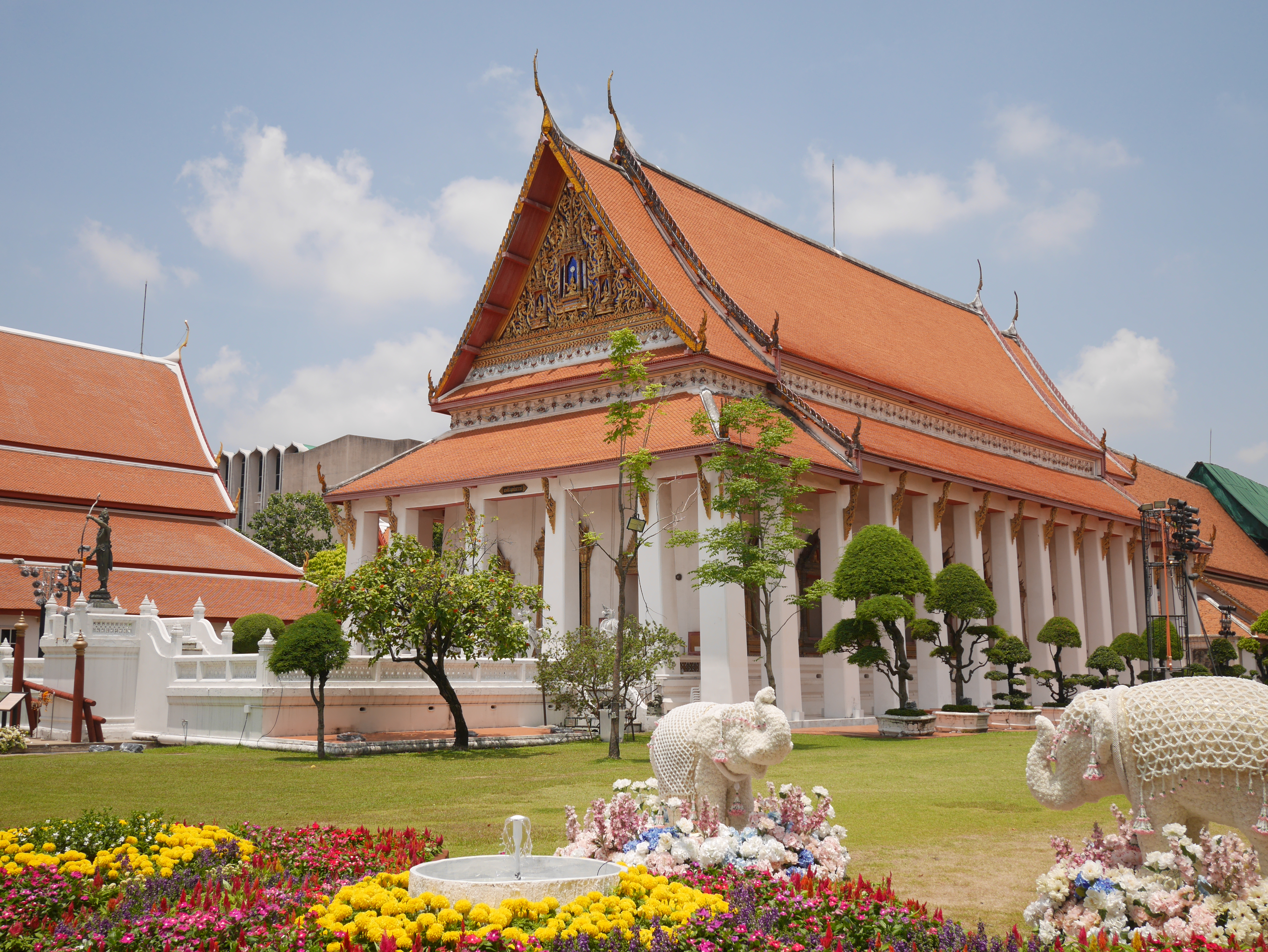 พระราชวังบวรสถานมงคลและกำแพงพระราชวังบวรสถานมงคล(วังหน้า) เจ้าของบัญชี กสิณธร ราชโอรส เป็นเจ้าของบัญชีเดียวกับ บัญชี Phonlakrit Sunthornphon ของ Facebook บัญชี Tsutomu RIkimi ของ Google และ Panoramio .com บัญชี ซูบารุโยของ กสิณธร ราชโอรส same account holder of Facebook (Phonlakrit Sunthornphon),Google and (Tsutomu RIkimi) and ซูบารุโย at